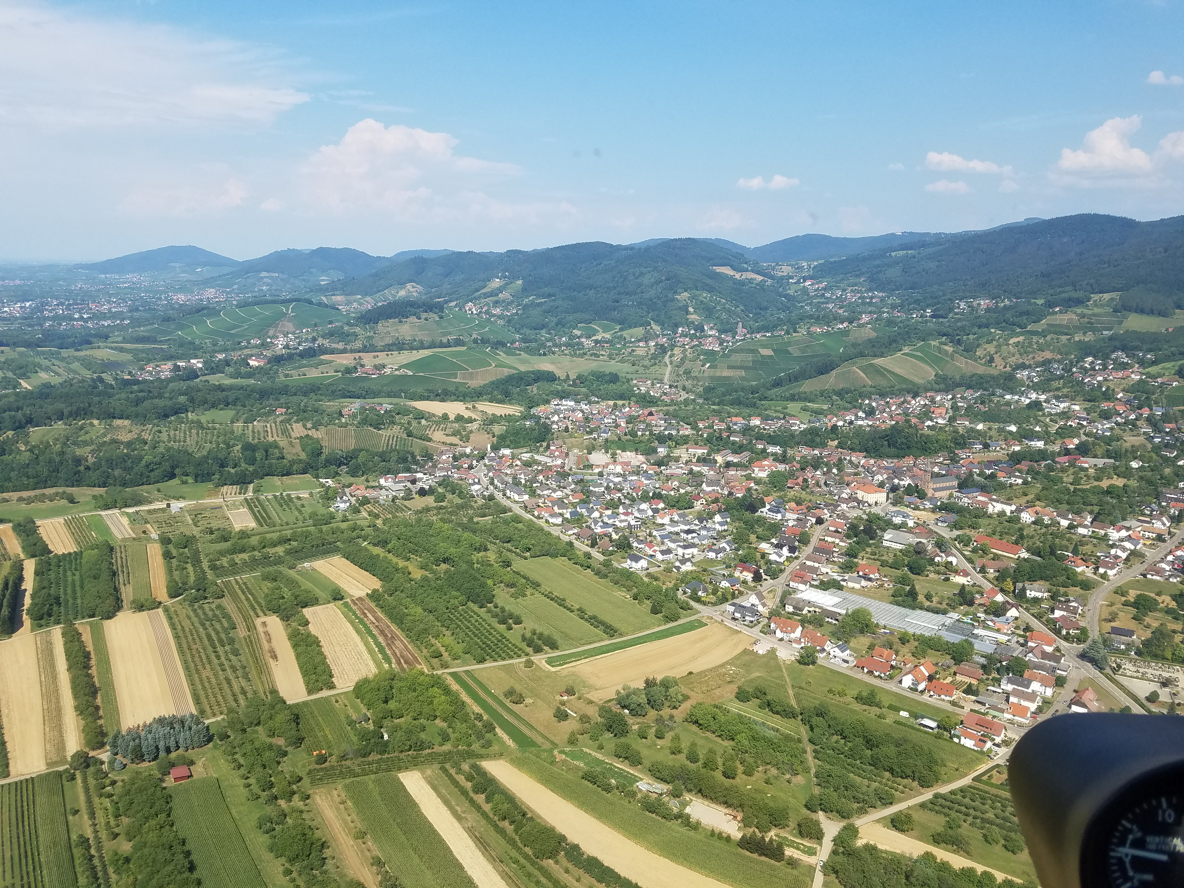 Luftaufnahme von Lauf von Westen aus